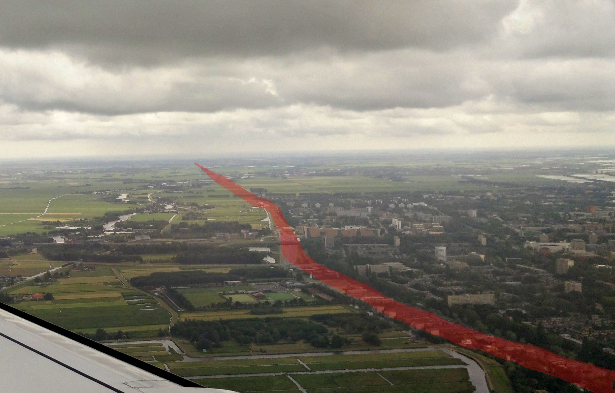 Het tracé van de nooit voltooide snelweg A3 bij Amstelveen, gezien naar het zuiden